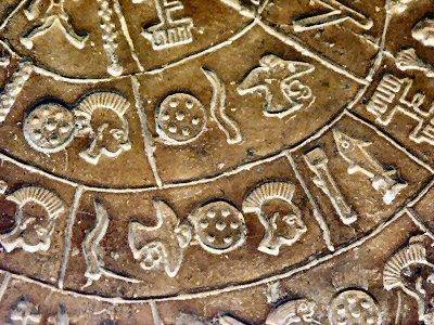 Motiv: Diskos von Phaistos, Detail 3 Fotografiert am: 11-Aug-2004 Ort: Archäologisches Museum, Heraklion, Kreta, Griechenland Fotograf: asb Kamera: Minolta Dimage 7 Hi Lizenz: GNU FDL 19:45, 17. Aug 2004 Asb 400 x 300 (117946 Byte) (Diskos.von.Phaistos_Detail.3_11-Aug-2004_asb_PICT3374.JPG)